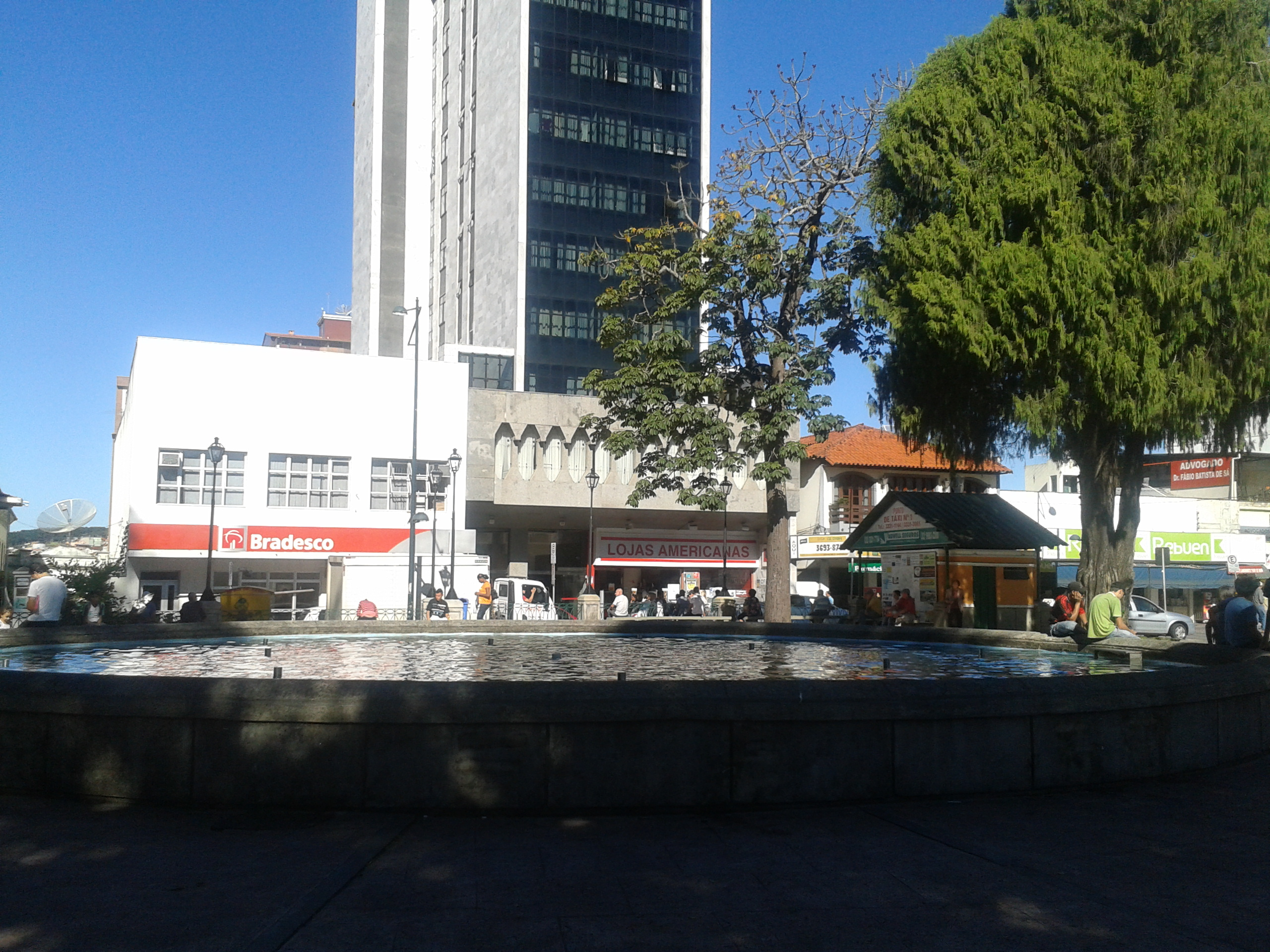 Imagem de Barbacena